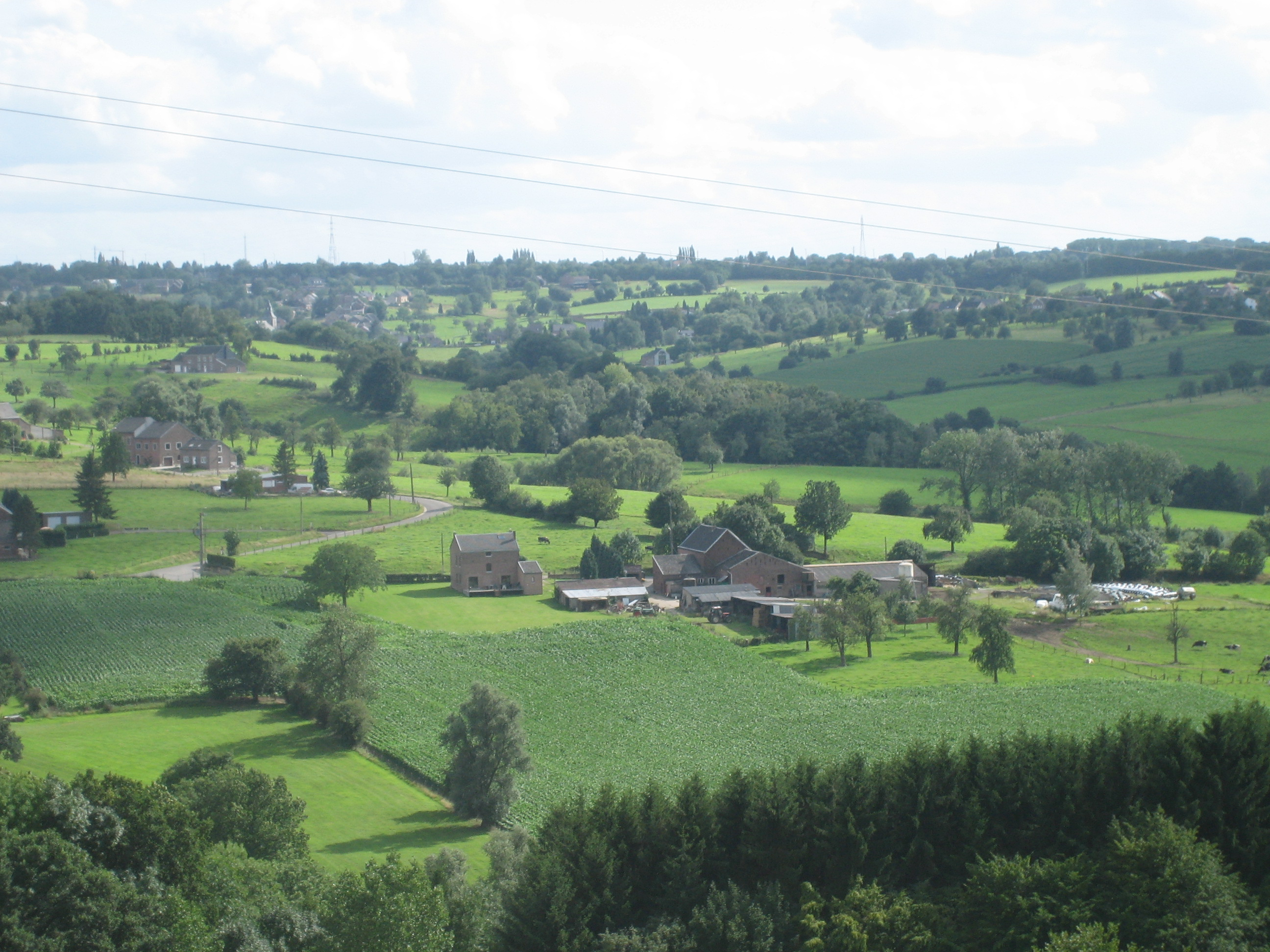 paysage du pays de Herve.jpg